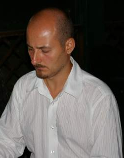 Luca Rasca, pianista